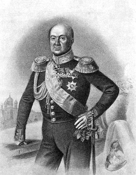 Генерал-адъютант граф Арсений Андреевич Закревский